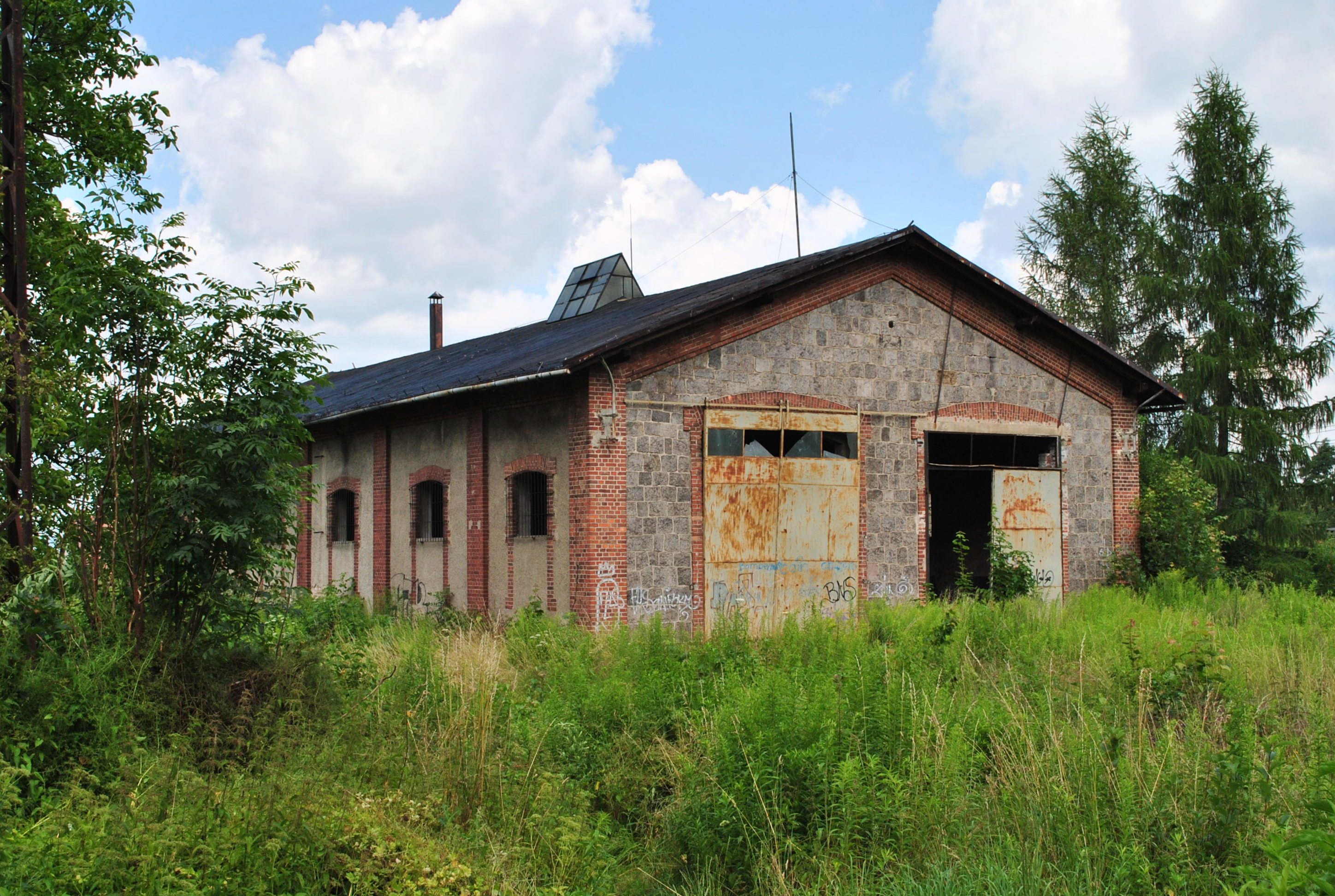 Nieczynna lokomotywownia na dawnej stacji Miłków